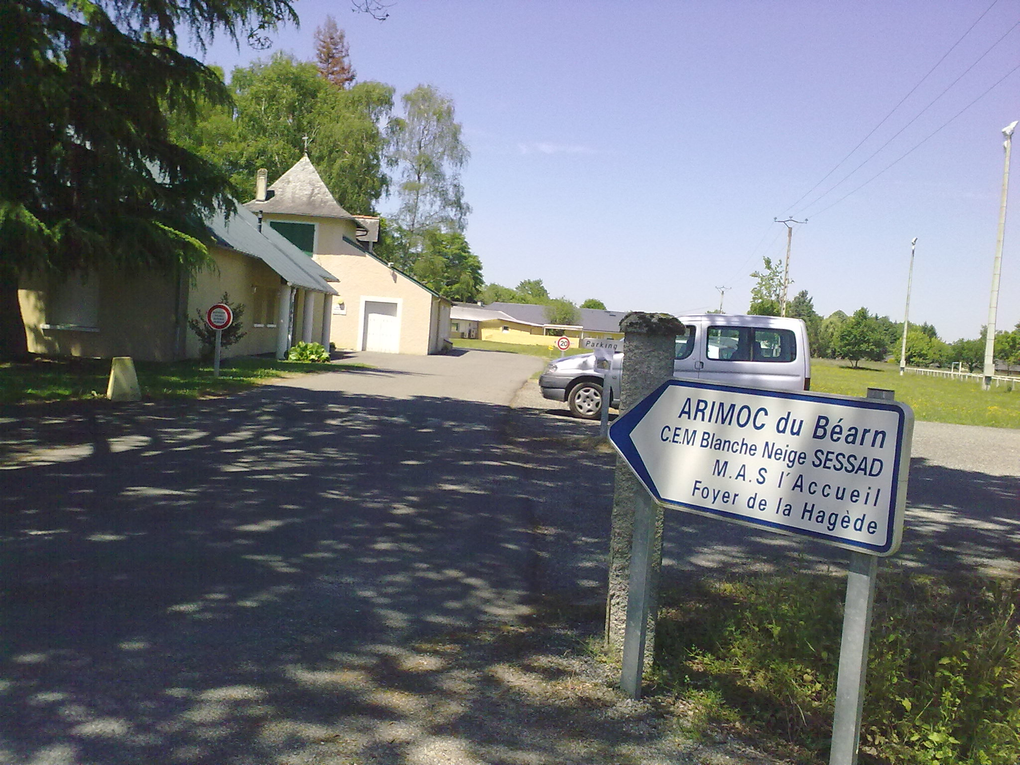 Entrée EST de ARIMOC à Saint-Jammes. Centre médical pour infirmes moteurs d'origine cérébrale.